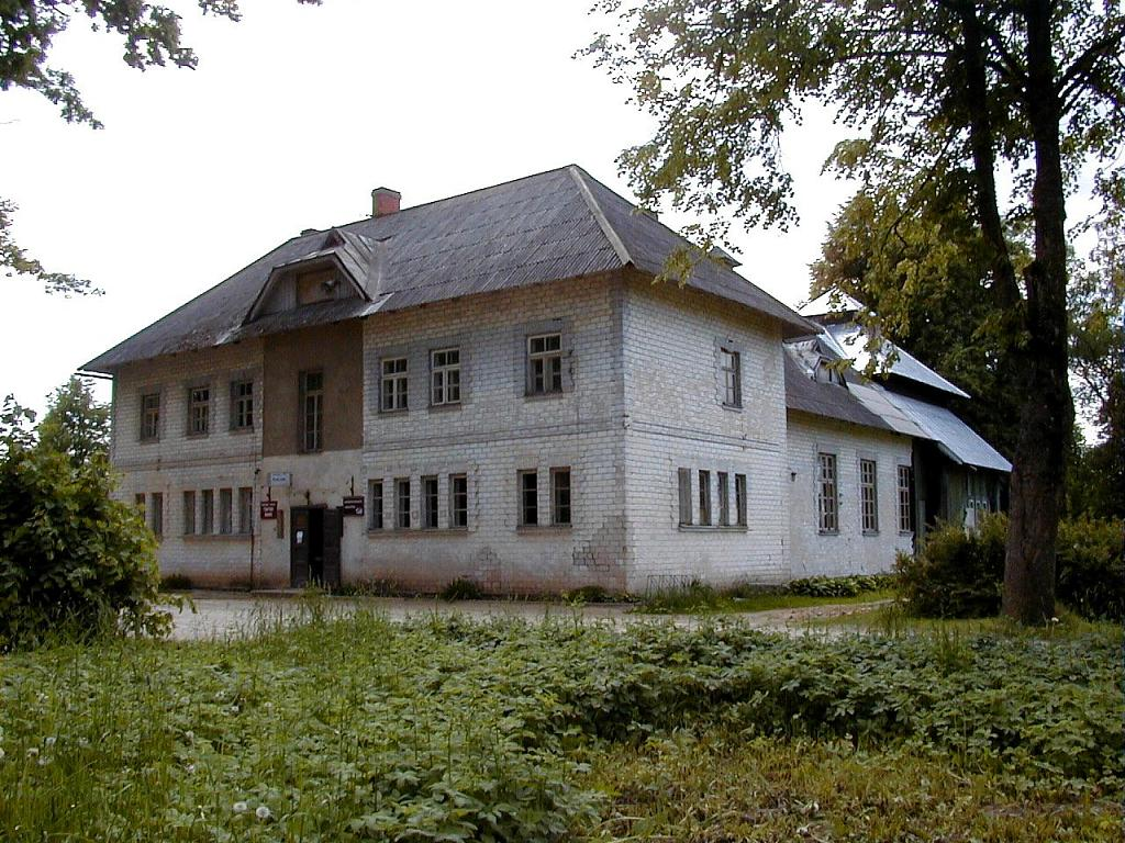 Mārsnēnu tautas nams 2002-06-01